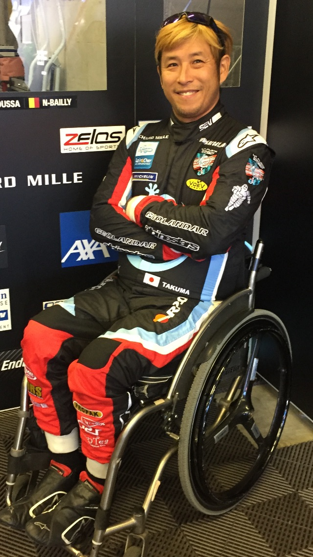 青木拓磨 2018年フランス、ル・マンのブガッティサーキットにて